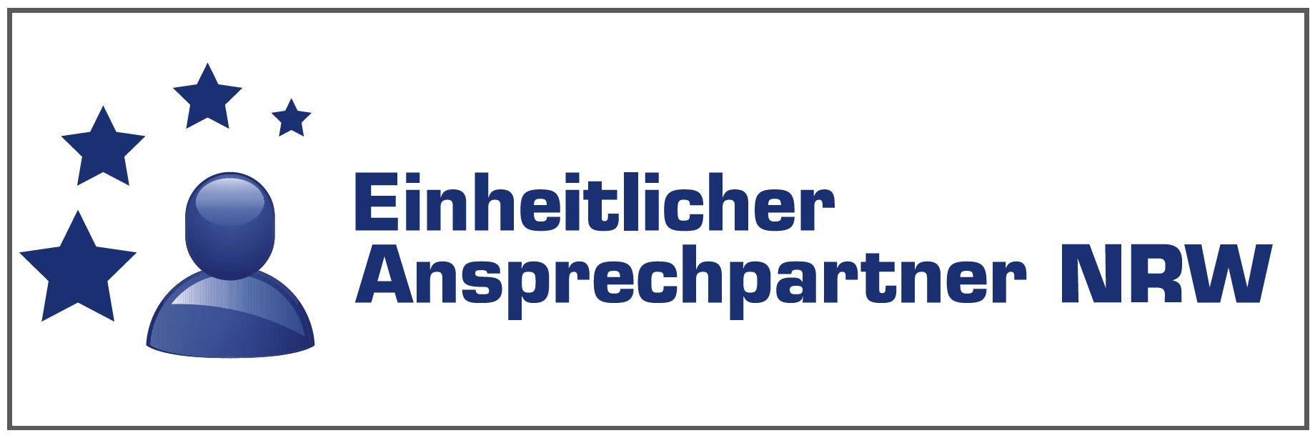 Banner Einheitlicher Ansprechpartner NRW